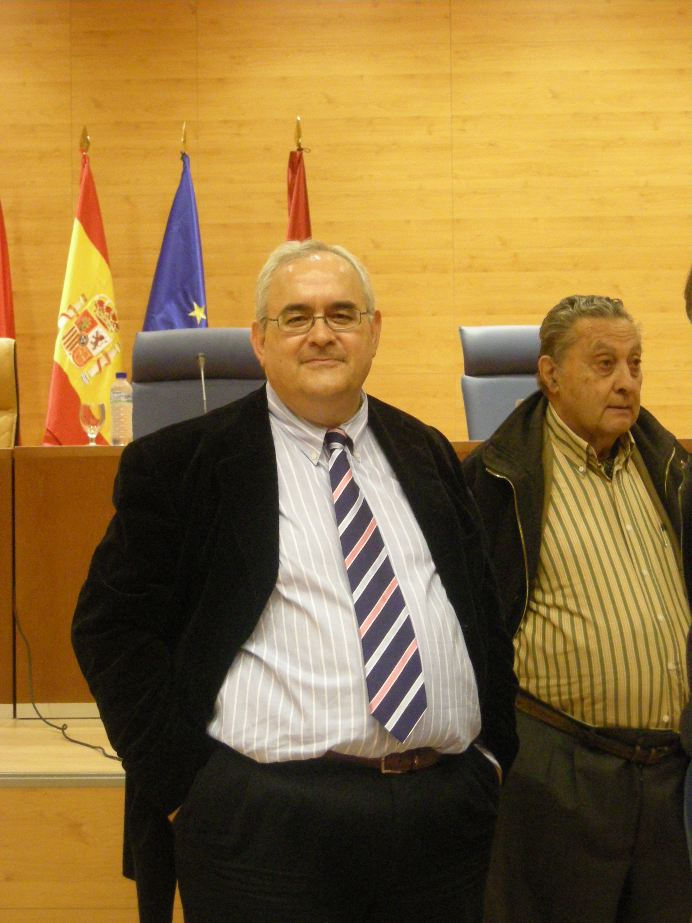 Mikel Buesa en una conferencia de Rosa Diez en la Facultad de Politicas de la UCM de Madrid